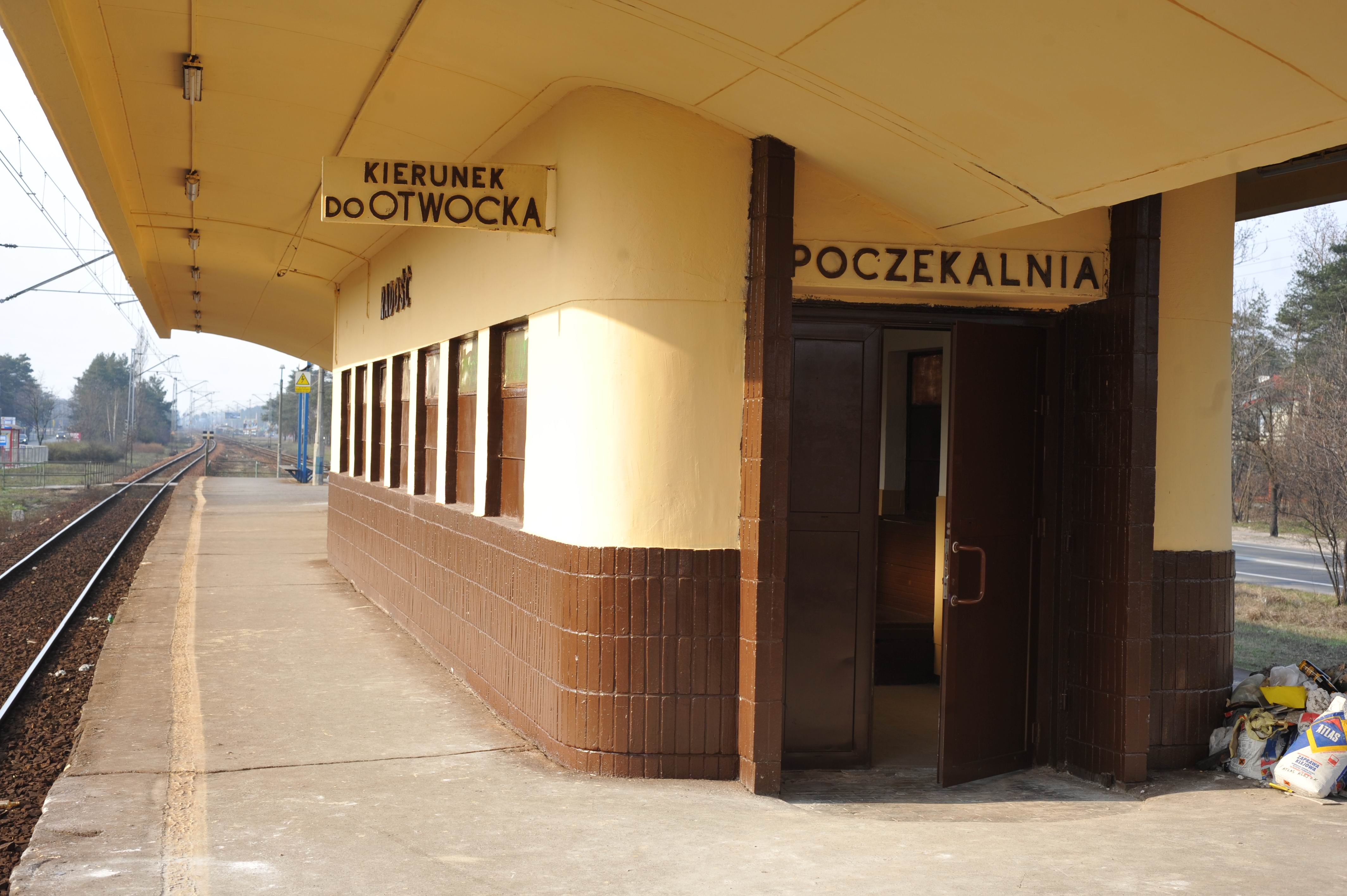 Poczekalnia na stacji kolejowej Warszawa Radość